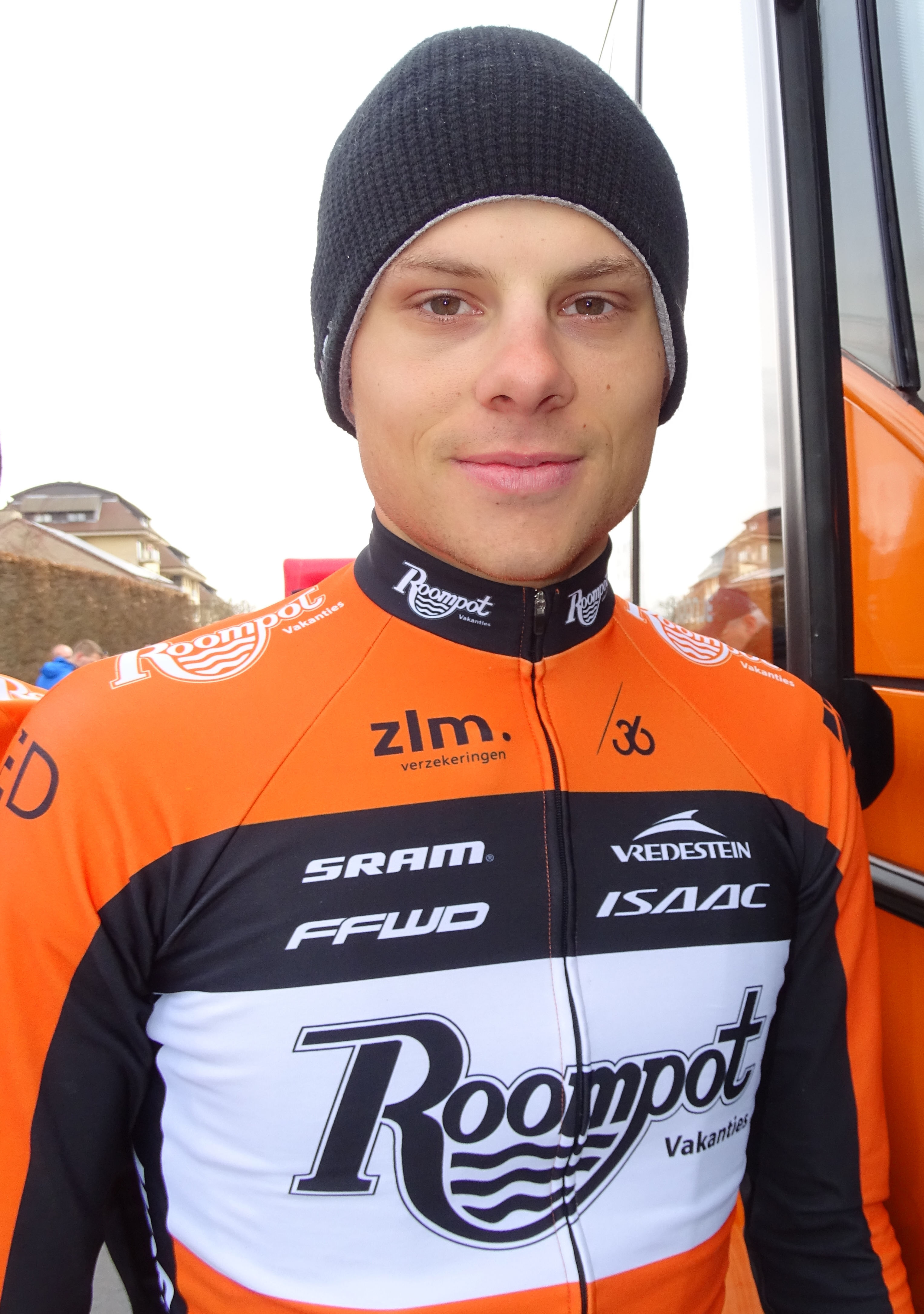 Reportage réalisé le vendredi 27 mars à l'occasion du départ et de l'arrivée du Grand Prix E3 2015 à Harelbeke, Belgique.